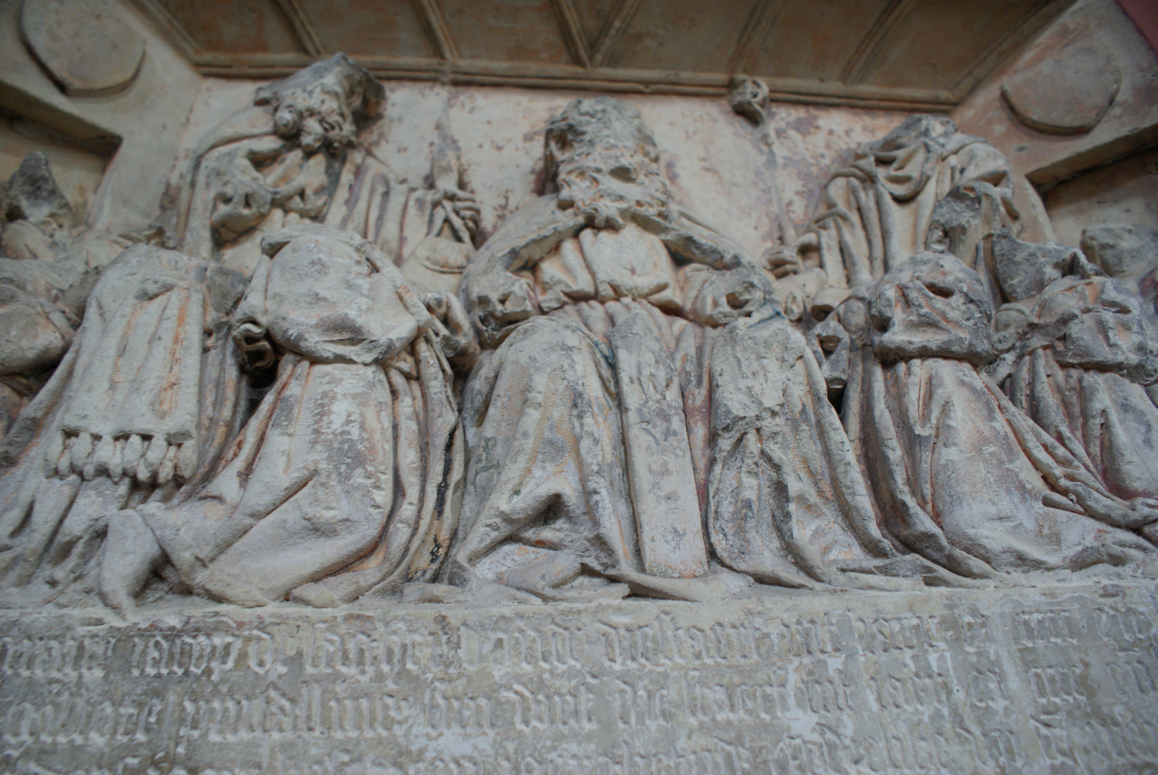 Sporen van de beeldenstorm in de St Medarduskerk in Wervik